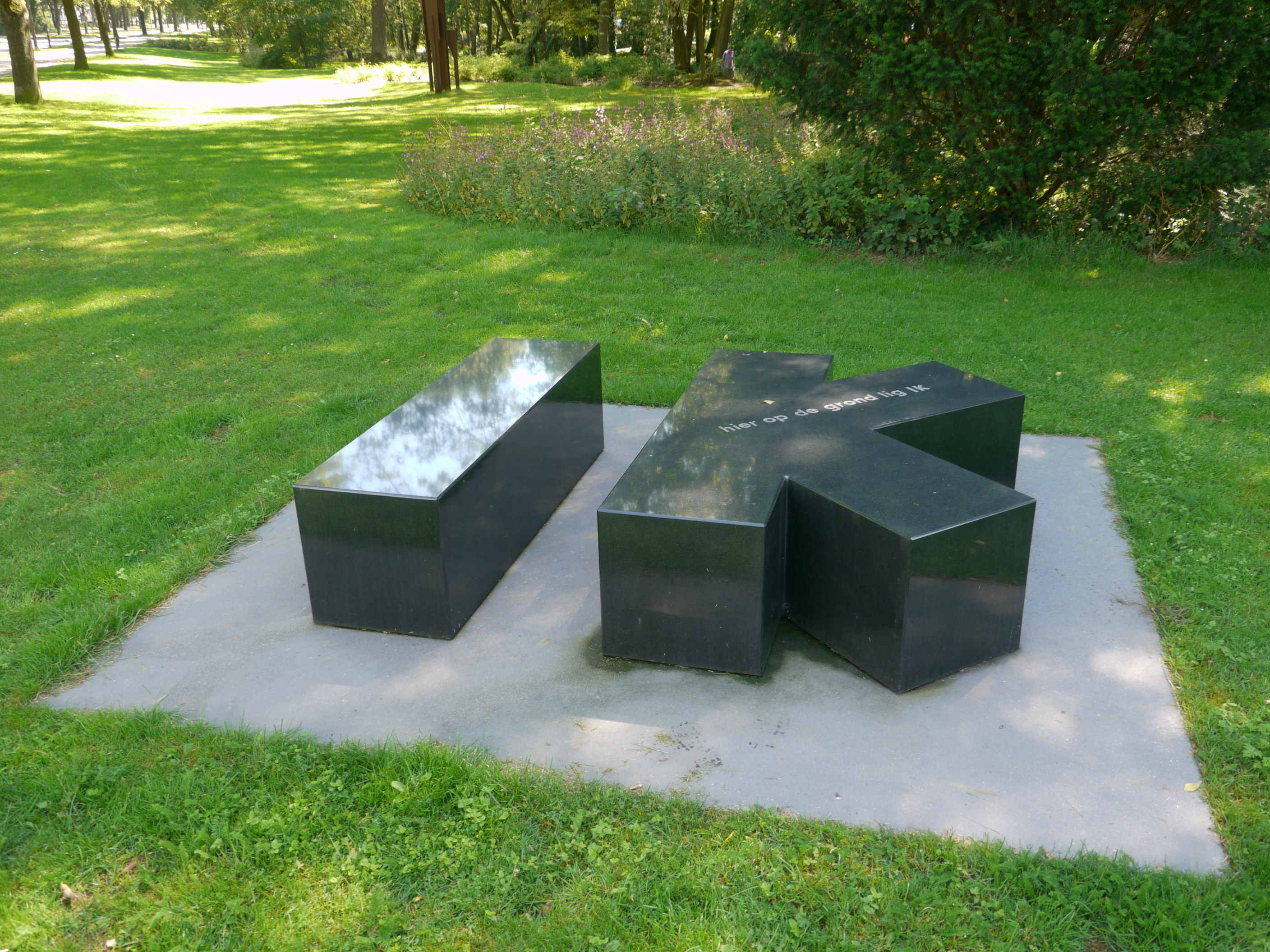 'IK': Beeld door Jan van Munster. Bovenop de letter 'K' staat de tekst 'hier op de grond lig ik' gegraveerd.